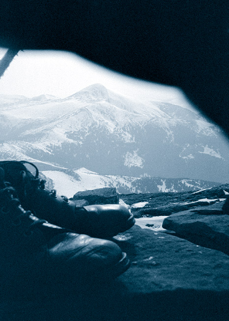 Вид Говерлы с каменного тура на вершине Петроса в конце апреля 1978 года.